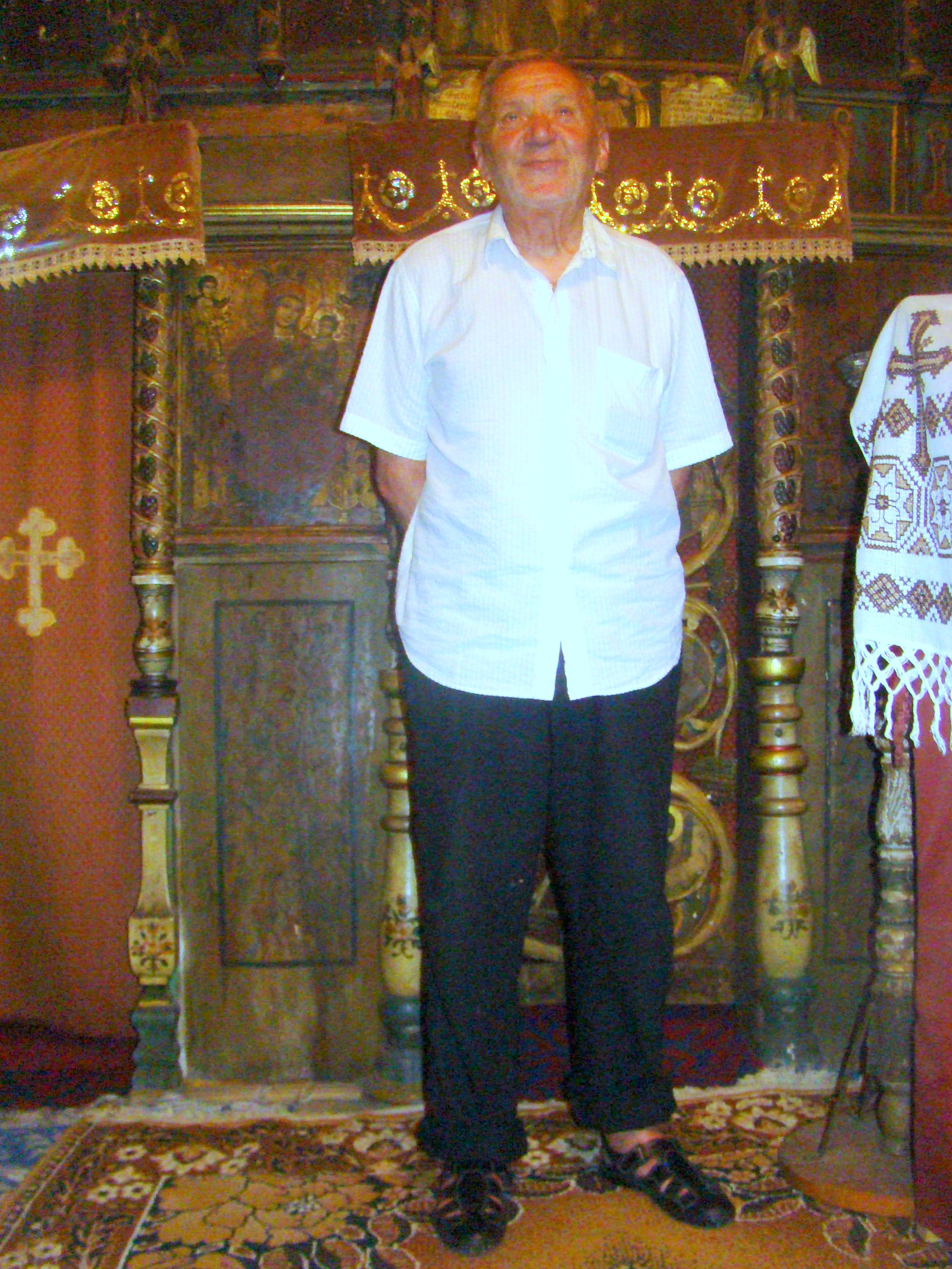 Biserica de lemn „Sfinții Arhangheli” din Reghin, județul Mureș